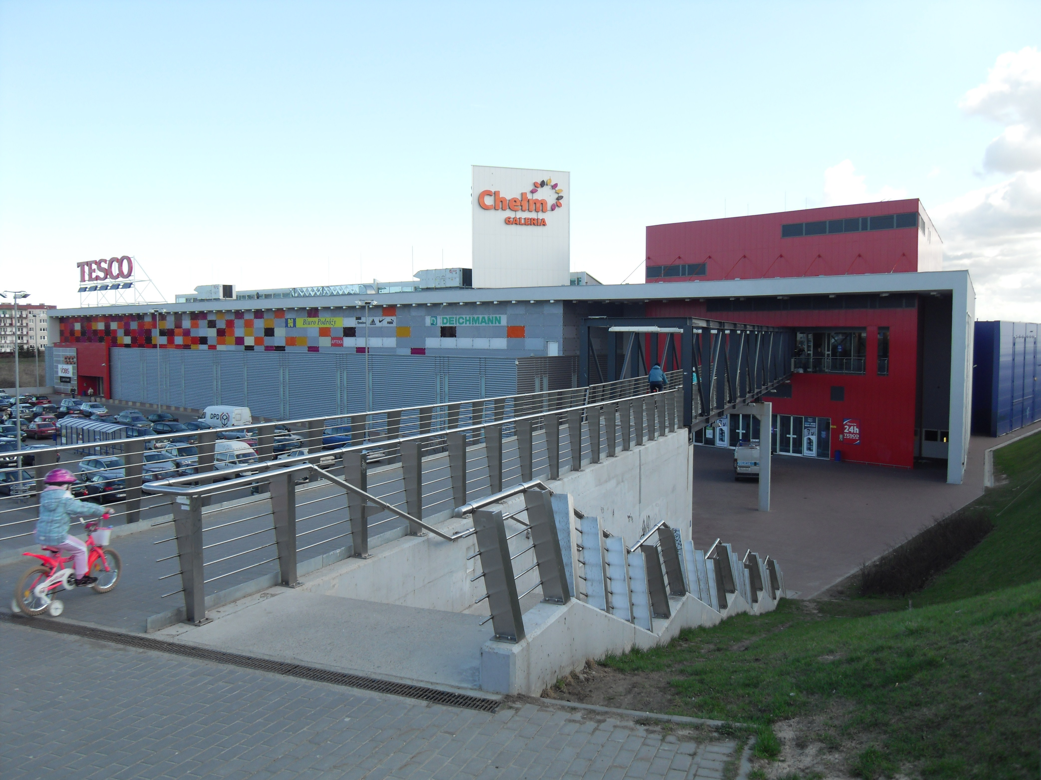 Gdańsk Chełm - Galeria Chełm.